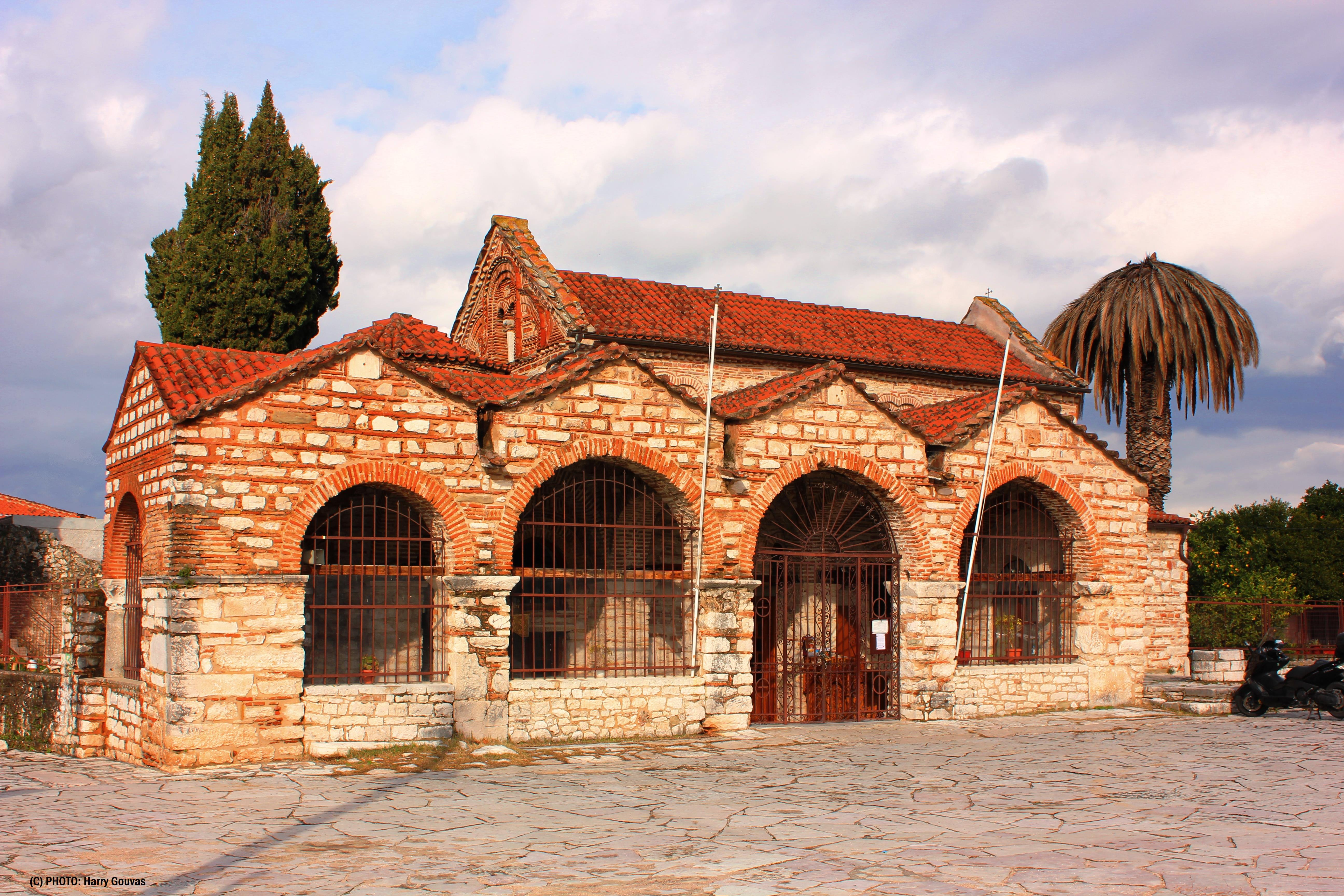 Ναός Αγίας Θεοδώρας Αρτας